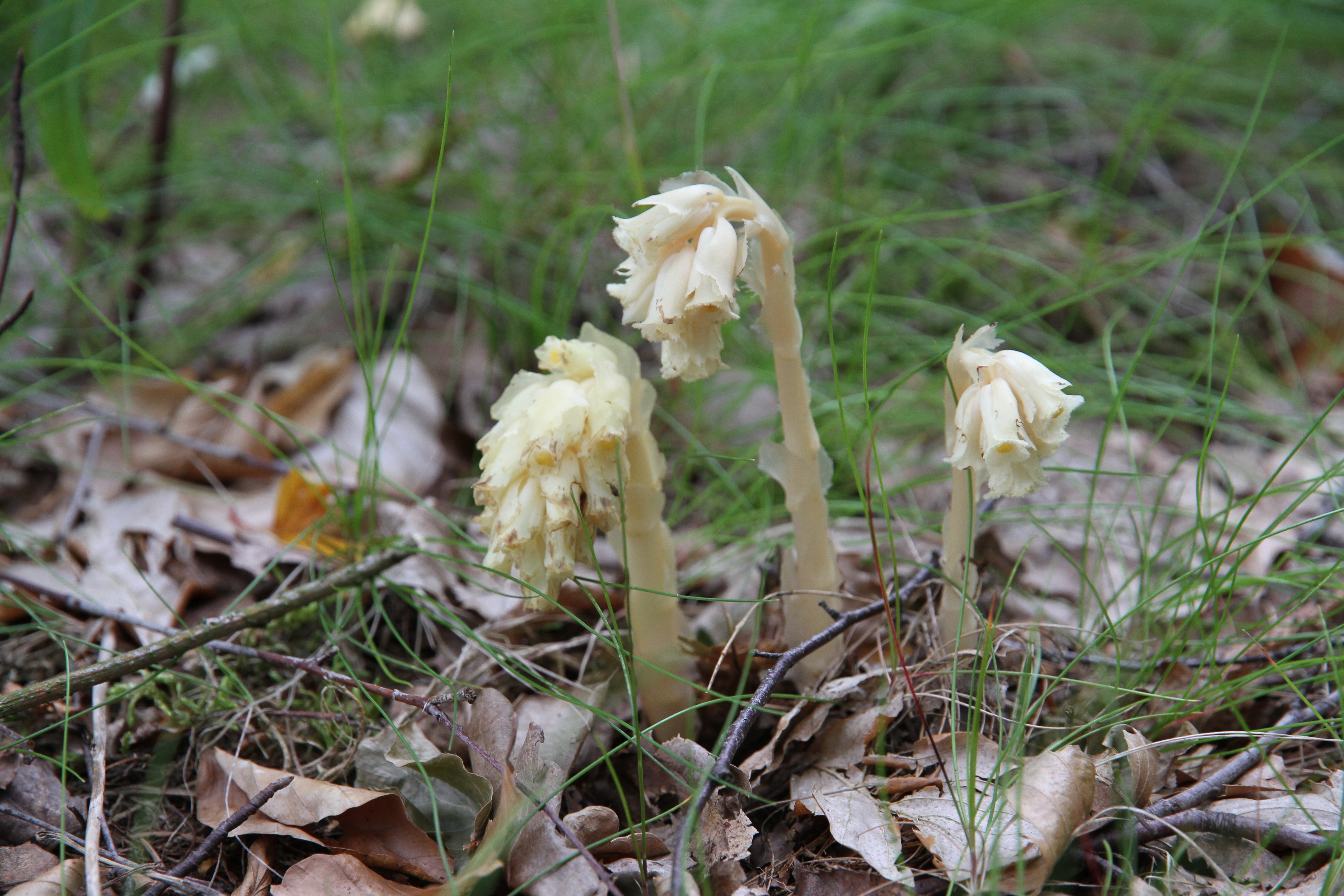 Tallört vid Midingsbråte, Tingsryd 19 juli 2015